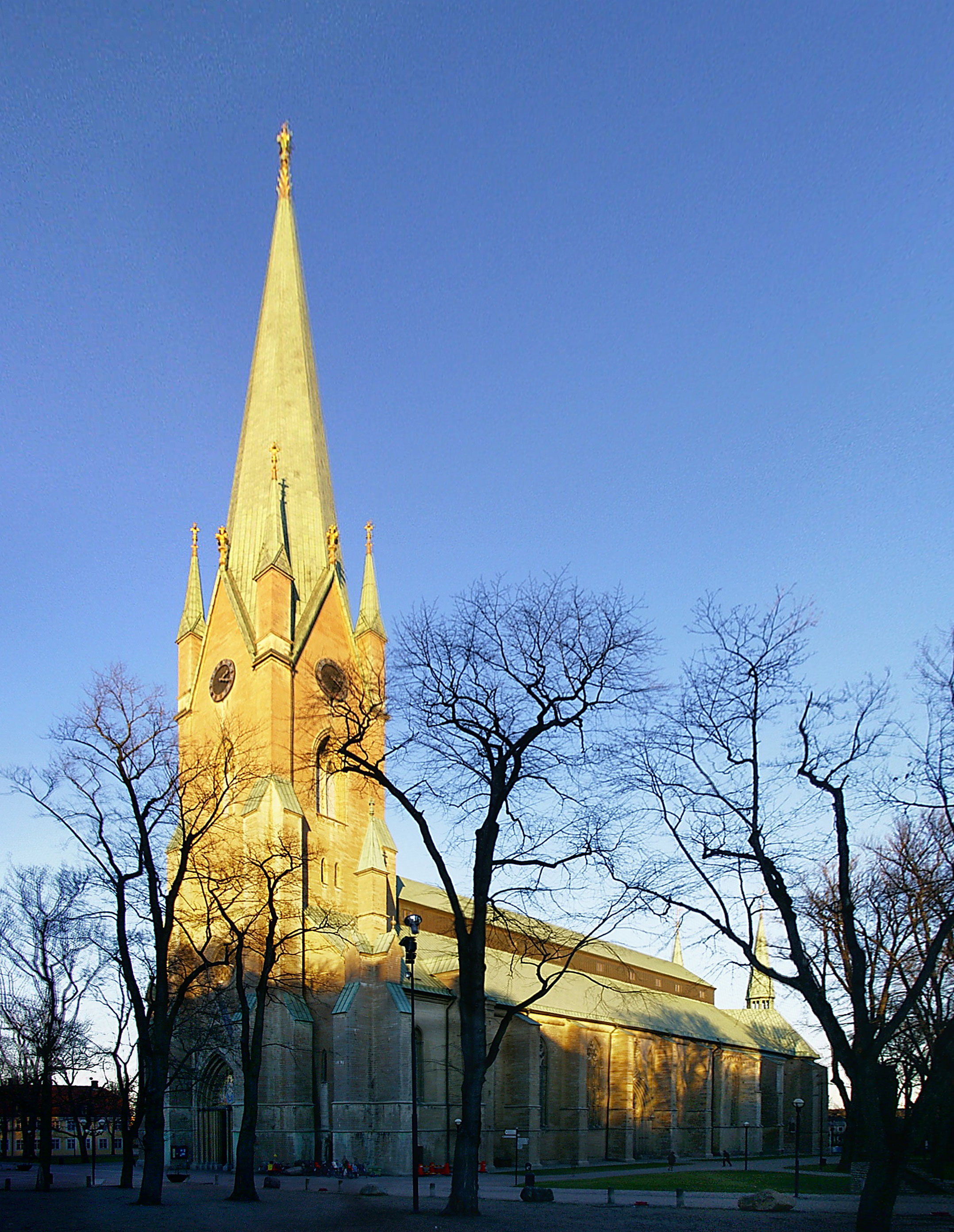 bearbeitete Version von :commons:image:Linkopings domkyrkan.jpg